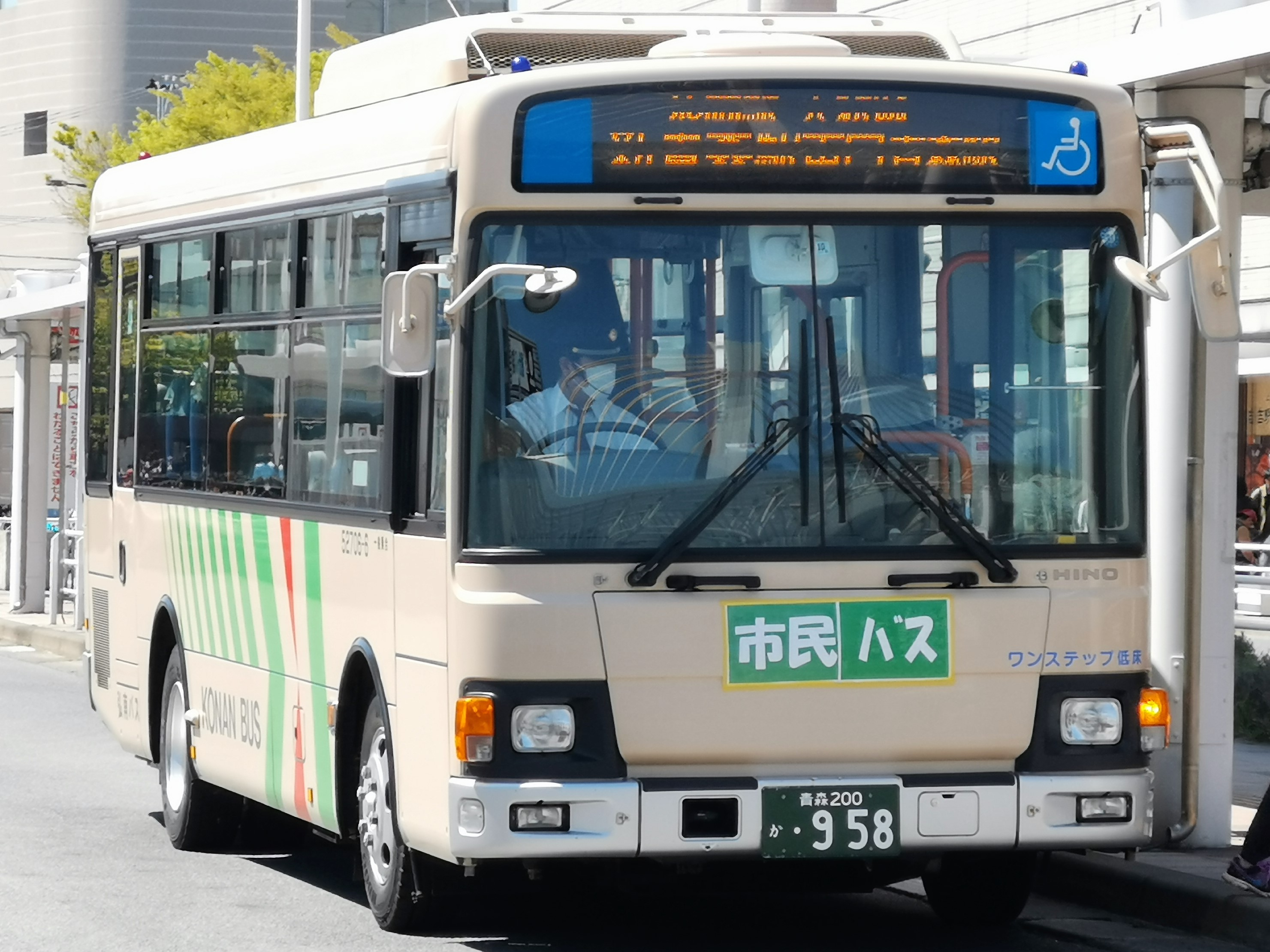 青森駅バス乗り場にて。車両番号より、日野自動車製、平成27年式、青森営業所所属の車両。青森市市民バスの浪岡線市民バス(大釈迦経由)の運用についていると思われる。